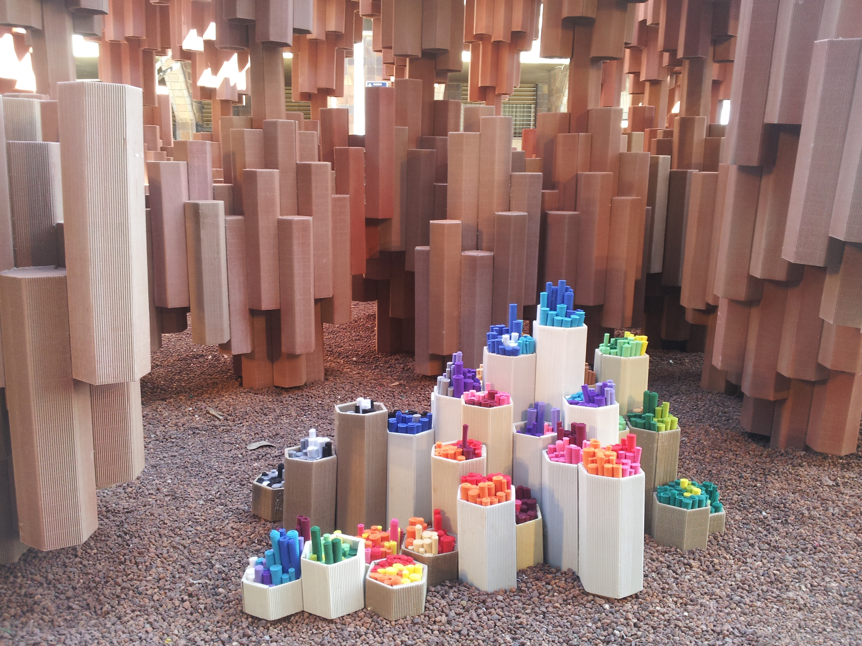 Monument de Castielfabib 2013.